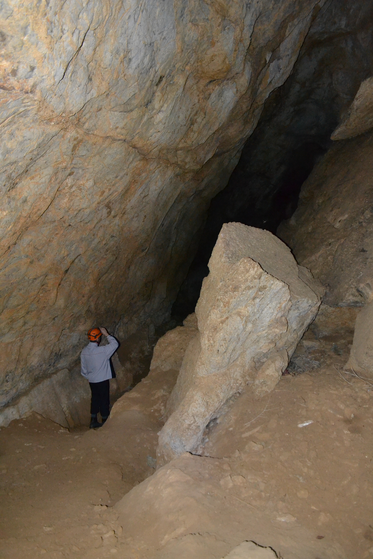 Улазна дворана